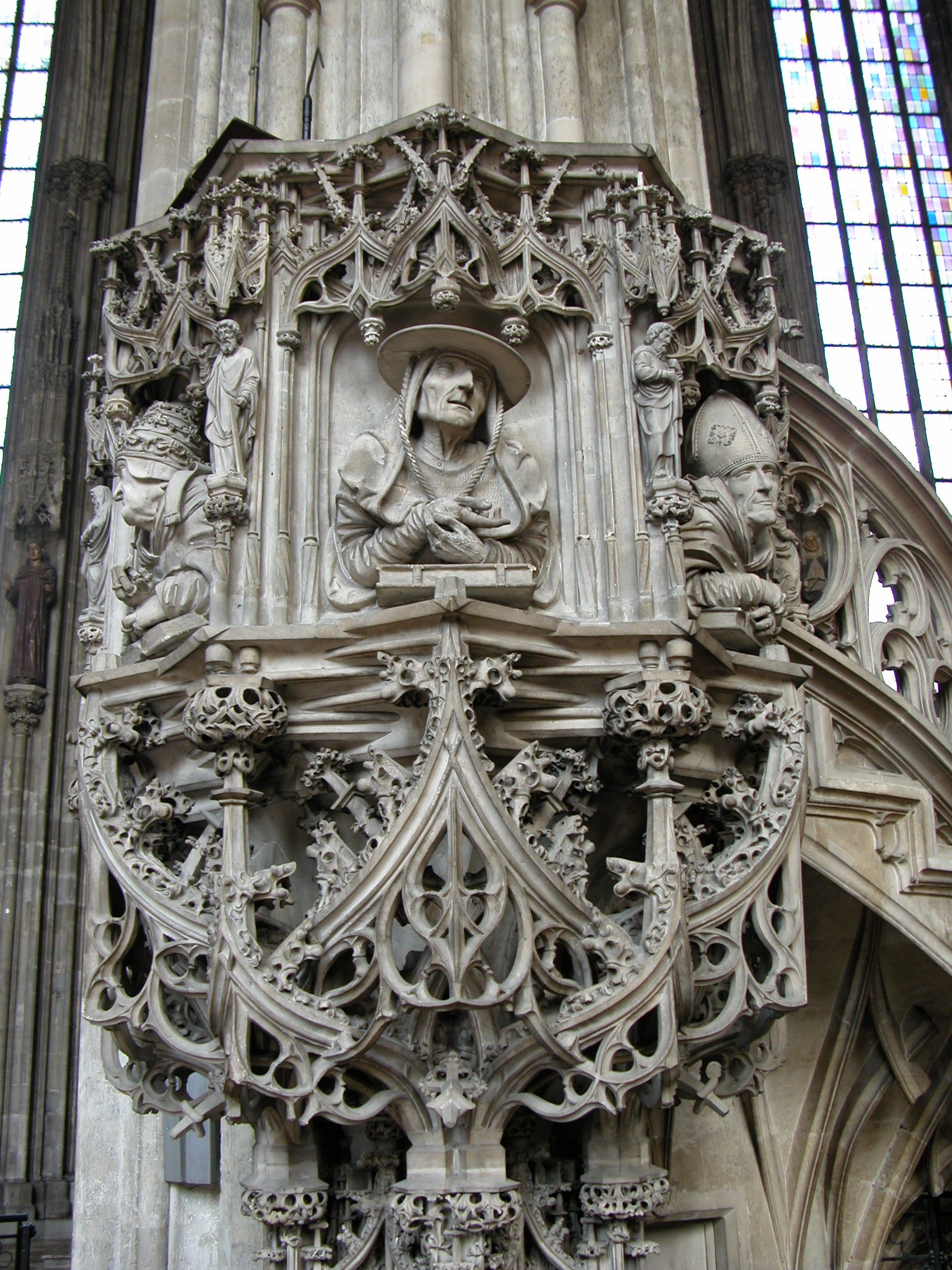 Pulpit of Stephansdom. (Kanzel des Stephansdoms (Wien))